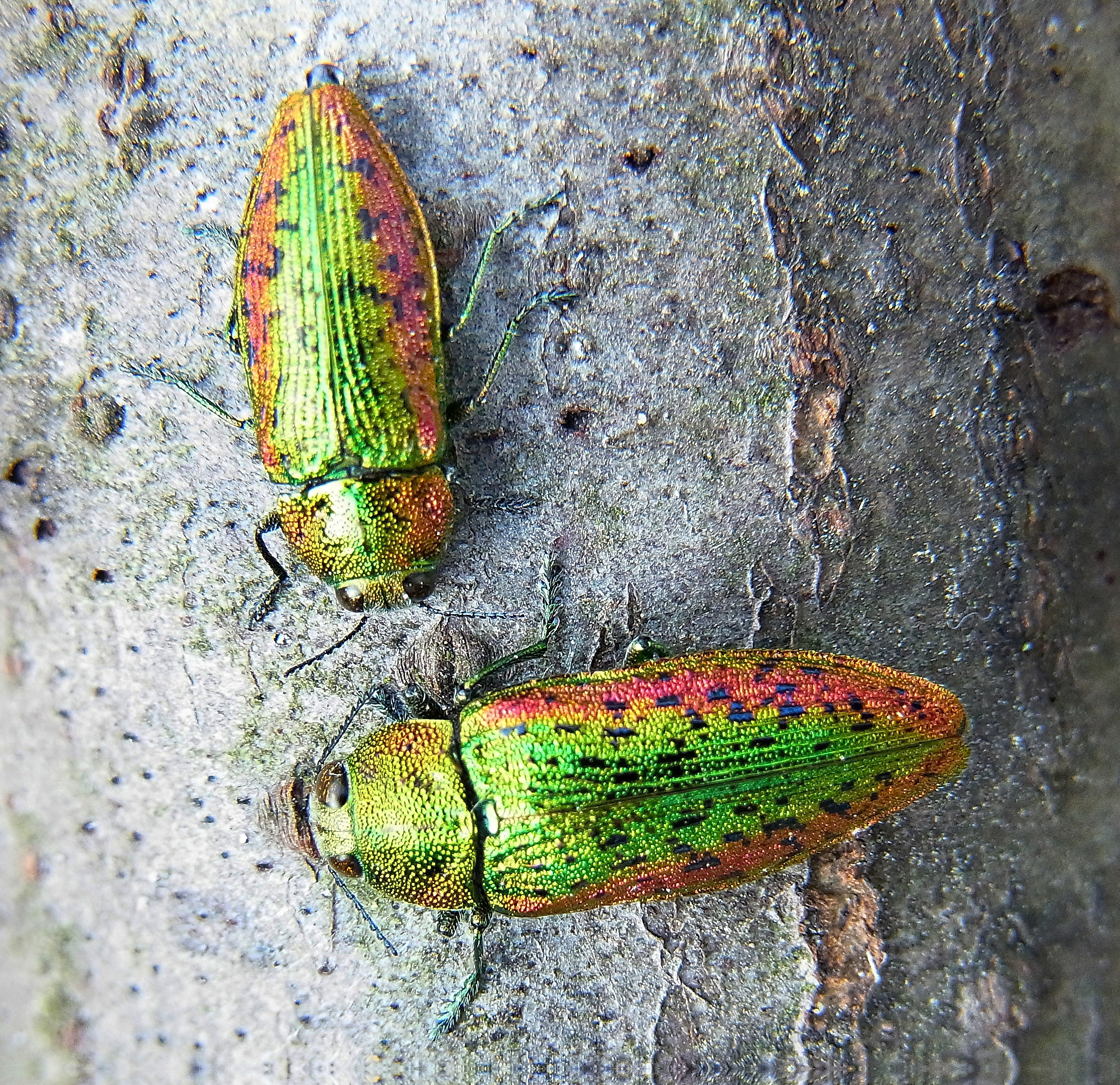 Lamprodila rutilans auf Linde, Ungarn, Villany-Bergland am 12.5.2012